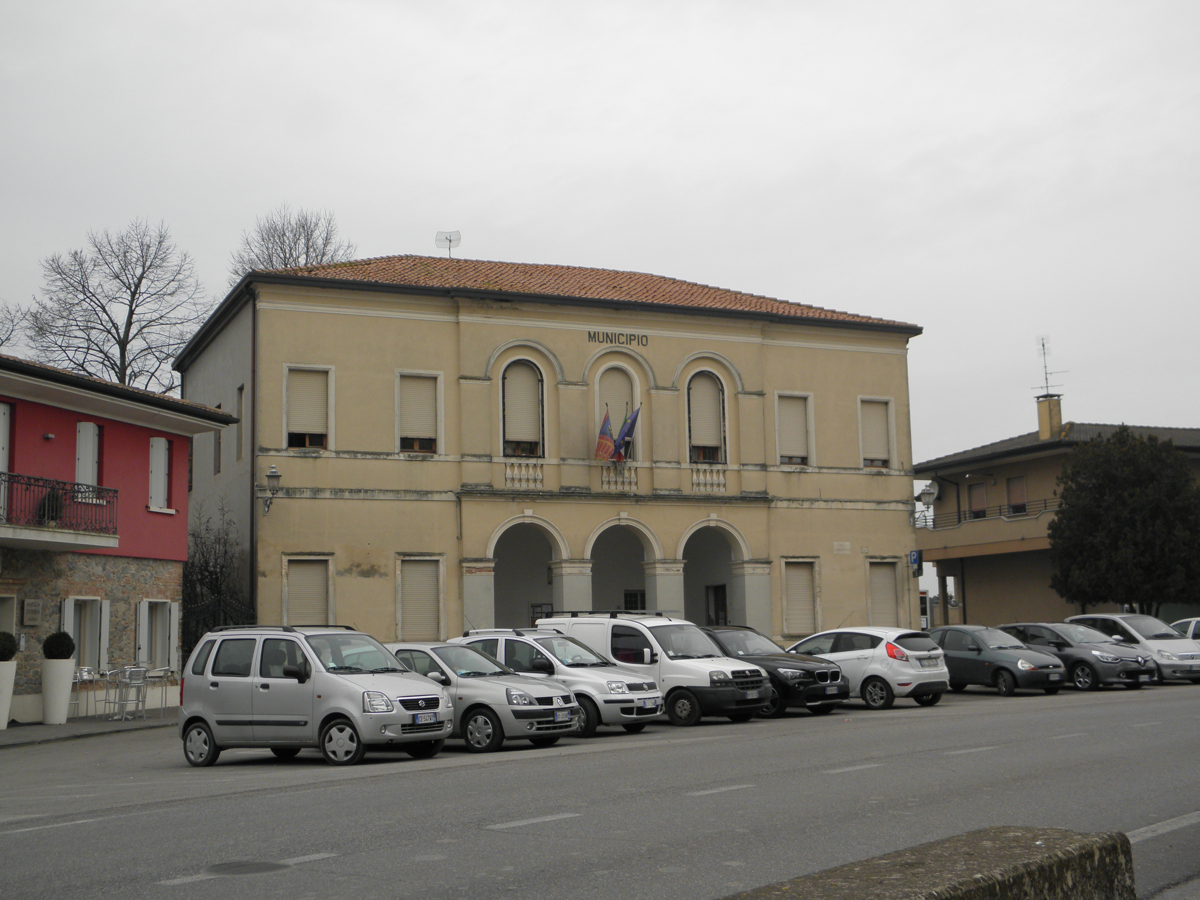 Megliadino San Vitale, la palazzina sede municipale.